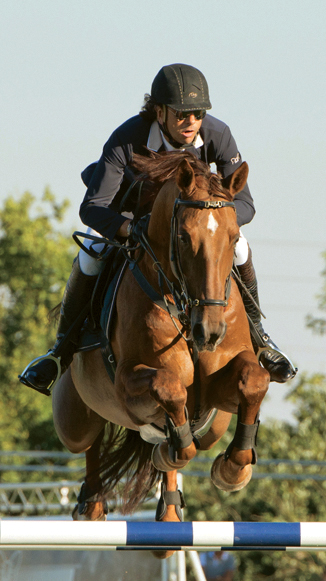 Natale Chiaudani in sella ad Almero 12 ai Campionati assoluti italiani di Arezzo 2012 - Foto